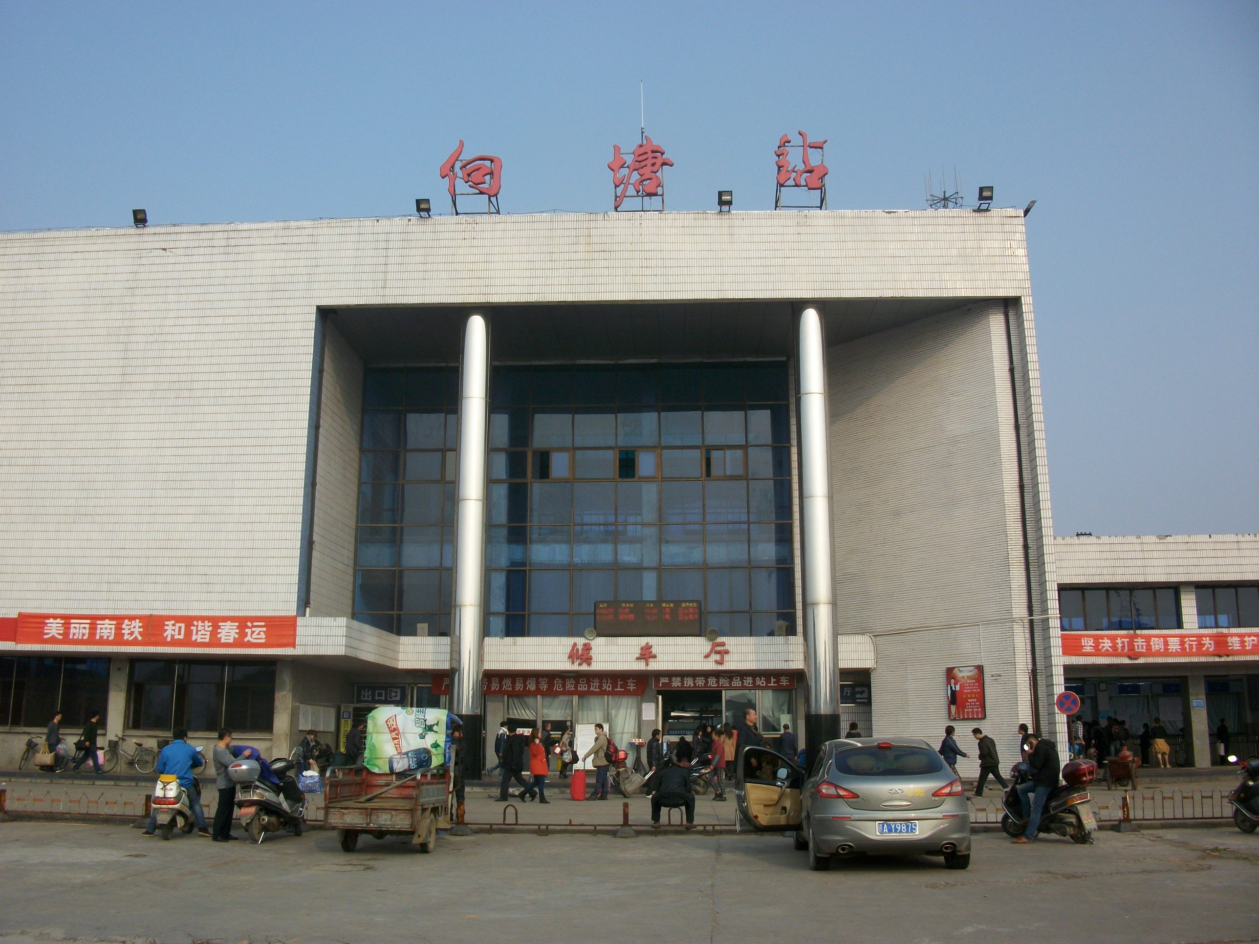 向塘站外景。